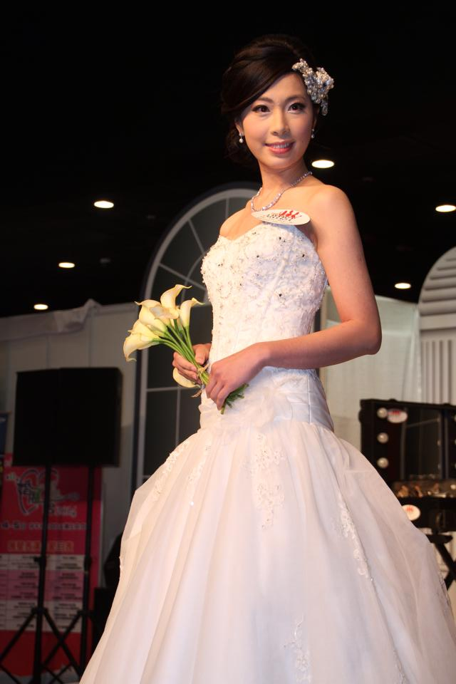 黃紫盈 婚禮活動司儀